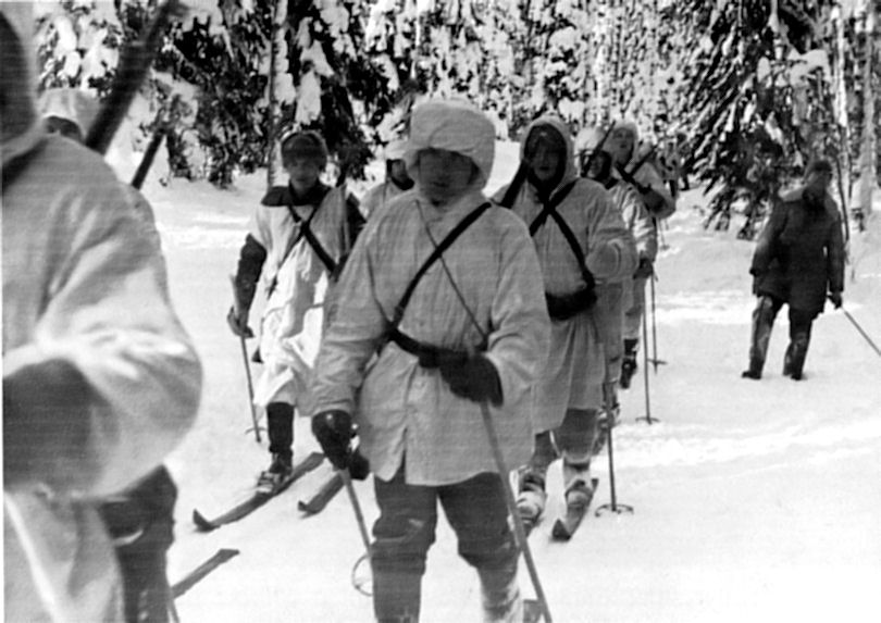 Ryhmä Talvelan Tolvajärven suunnan taistelijoita lumisessa maisemassa talvisodan aikaan vuonna 1940